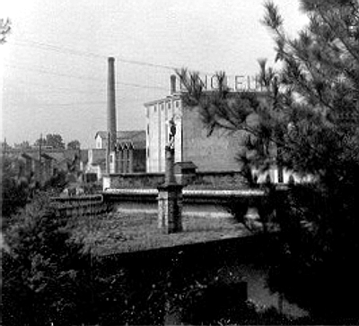 Linoleum-Werk in Giubiasco, Schweiz, 1932, bearbeitete Version